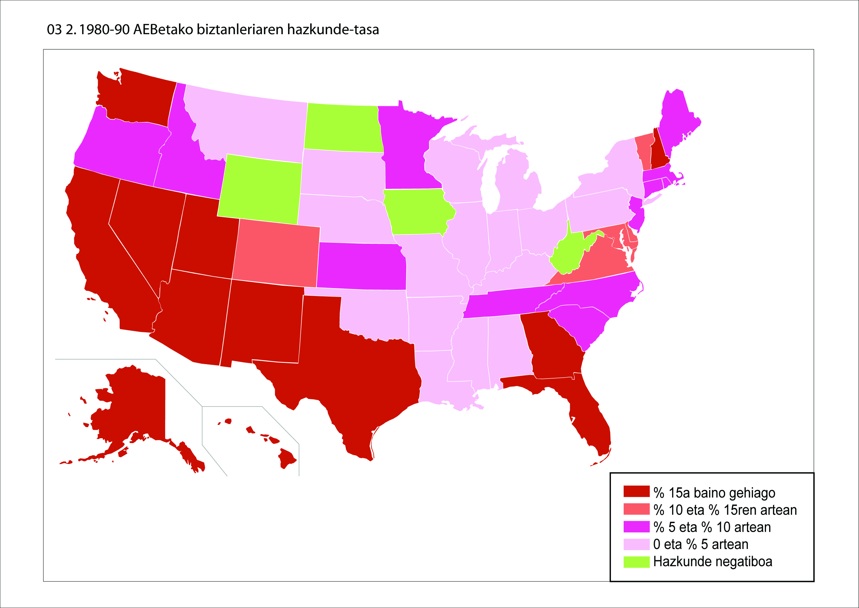 1980-1990 AEBko biztanleriaren hazkunde-tasa, UEUko liburutik hartua.